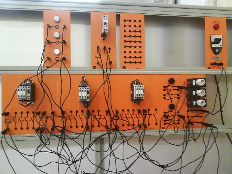 Painel em aula de acionamentos elétricos, em curso de eletrônica de 2010 no Centro Federal de Educação Tecnológica de Minas Gerais.